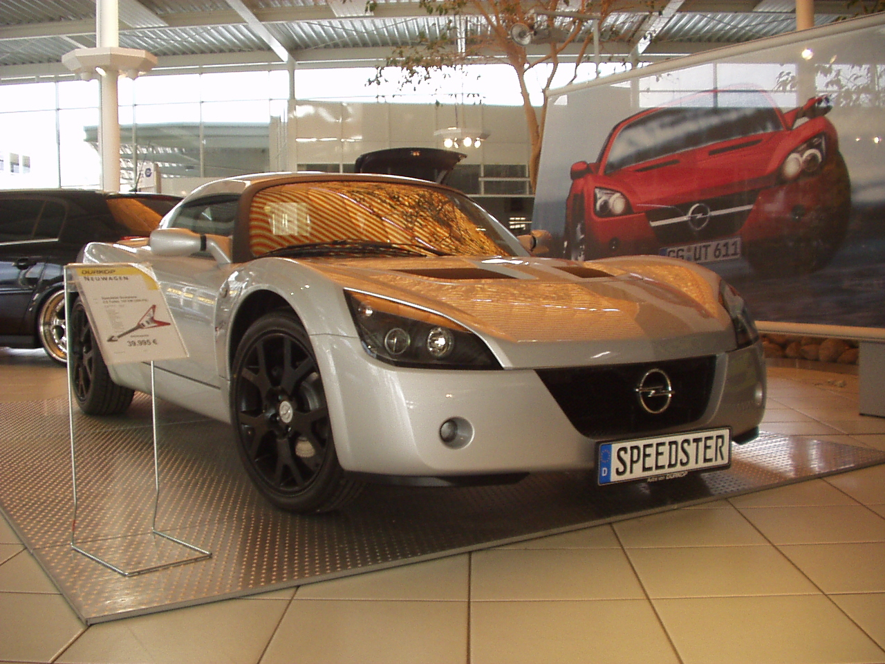 Opel Speedster in der "Scorpions-Edition"